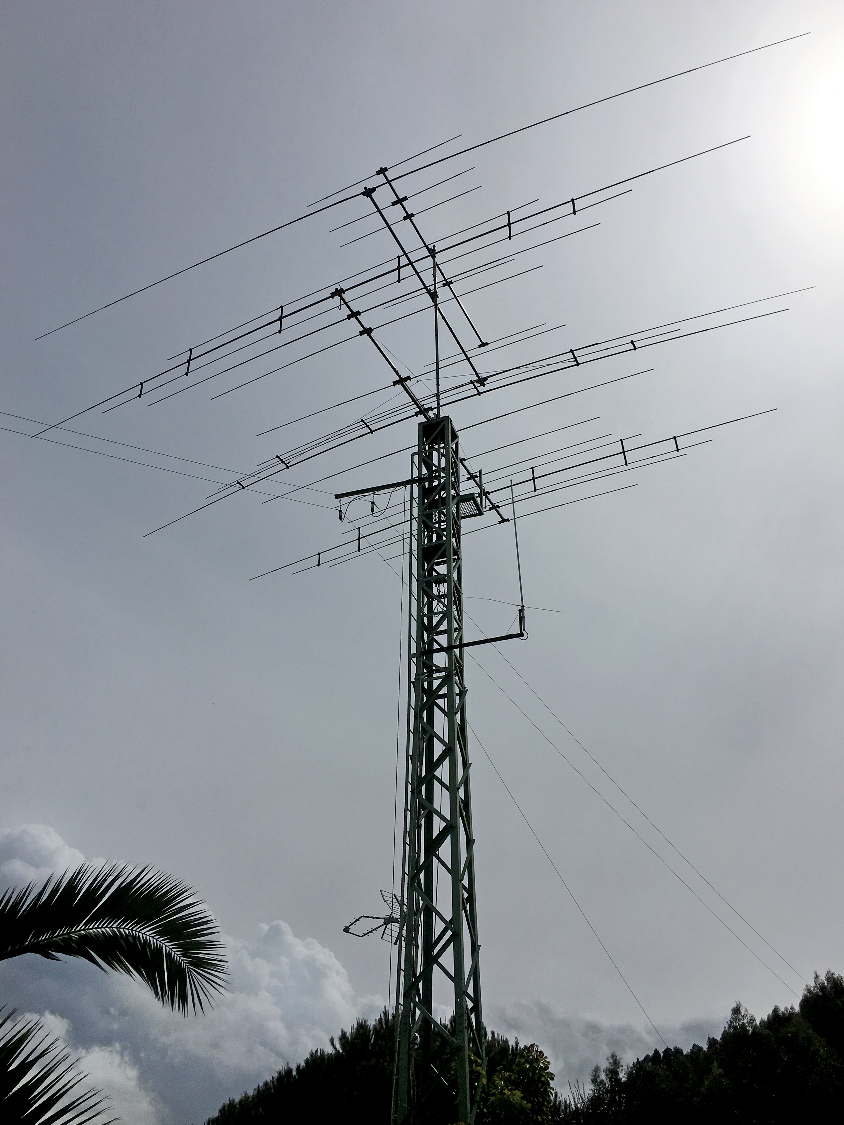 Torre con antenas direcciones apiladas